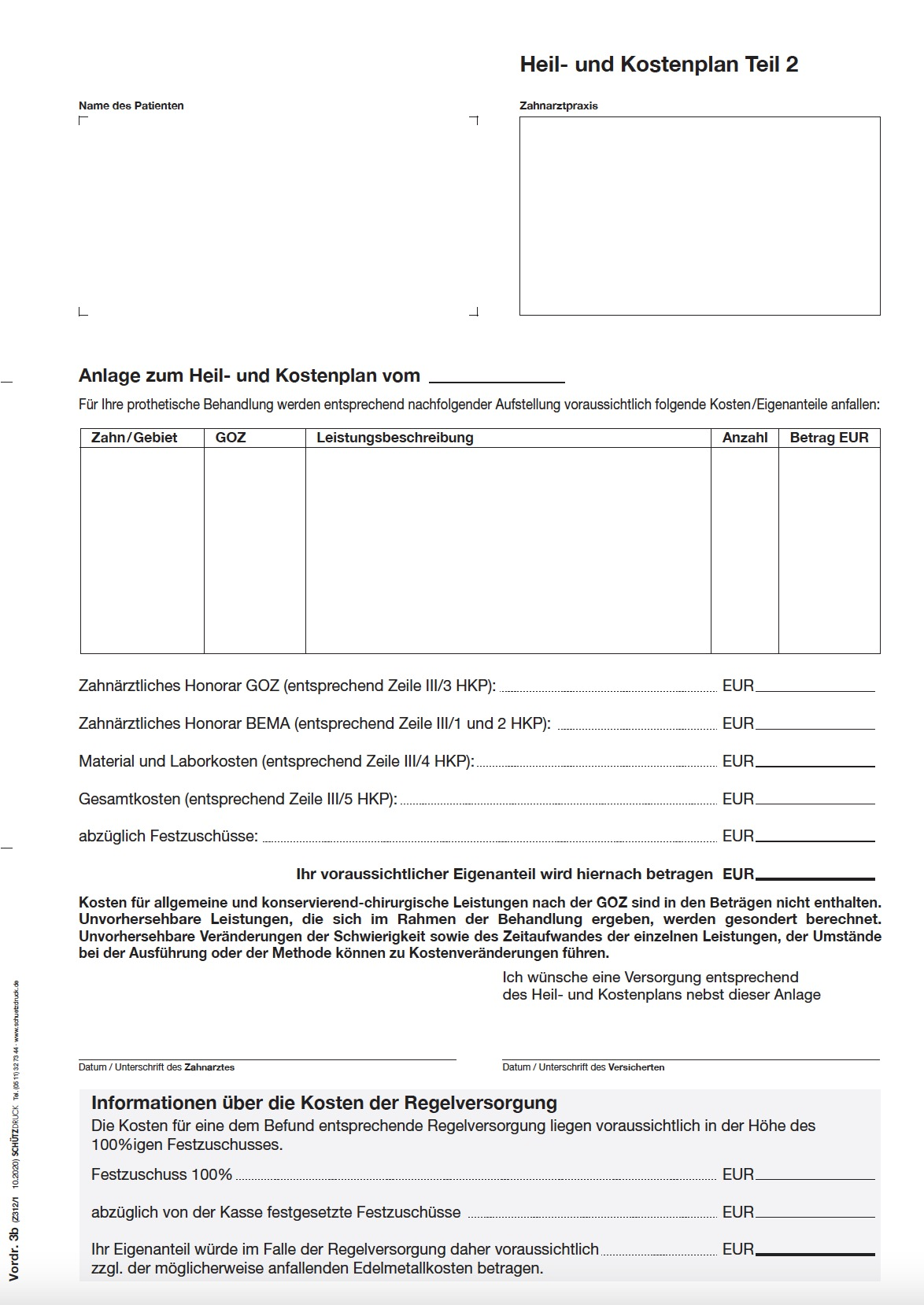 Heil- und Kostenplan (Seite 2) für Gesetzlich Versicherte in Deutschland (ist in dieser Form nicht mehr gültig)